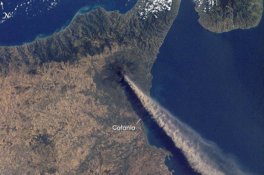 foto NASA (etna in activiteit ) 2001